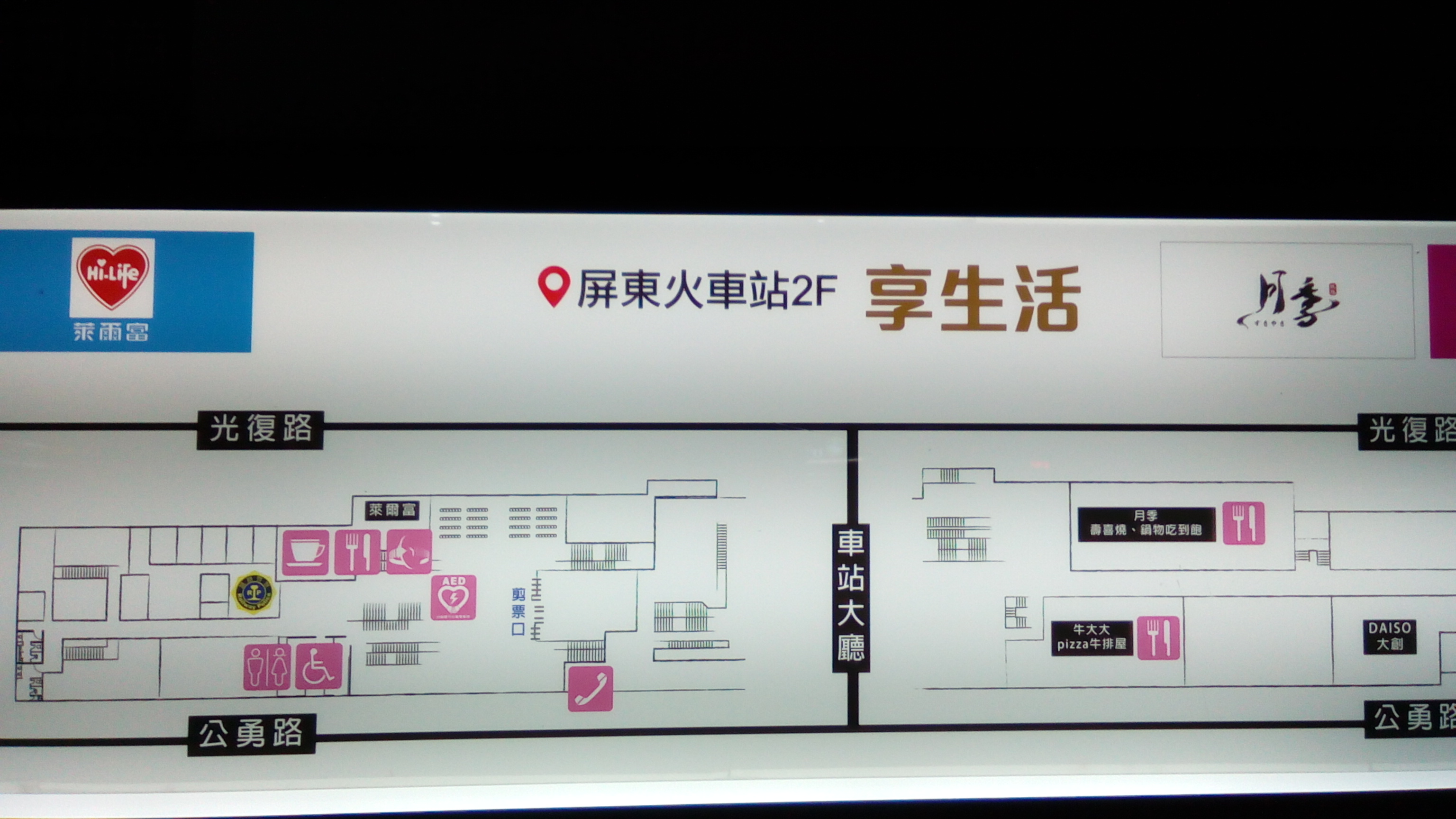 屏東車站一樓的站體平面圖